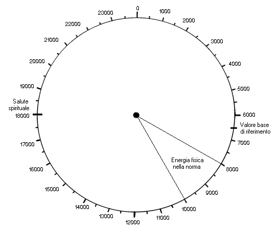 Un modello del biometro di Bovis, utilizzato per quantificare le vibrazioni emanate da cibi, luoghi, o esseri viventi, in base al valore delle radiazioni emesse.